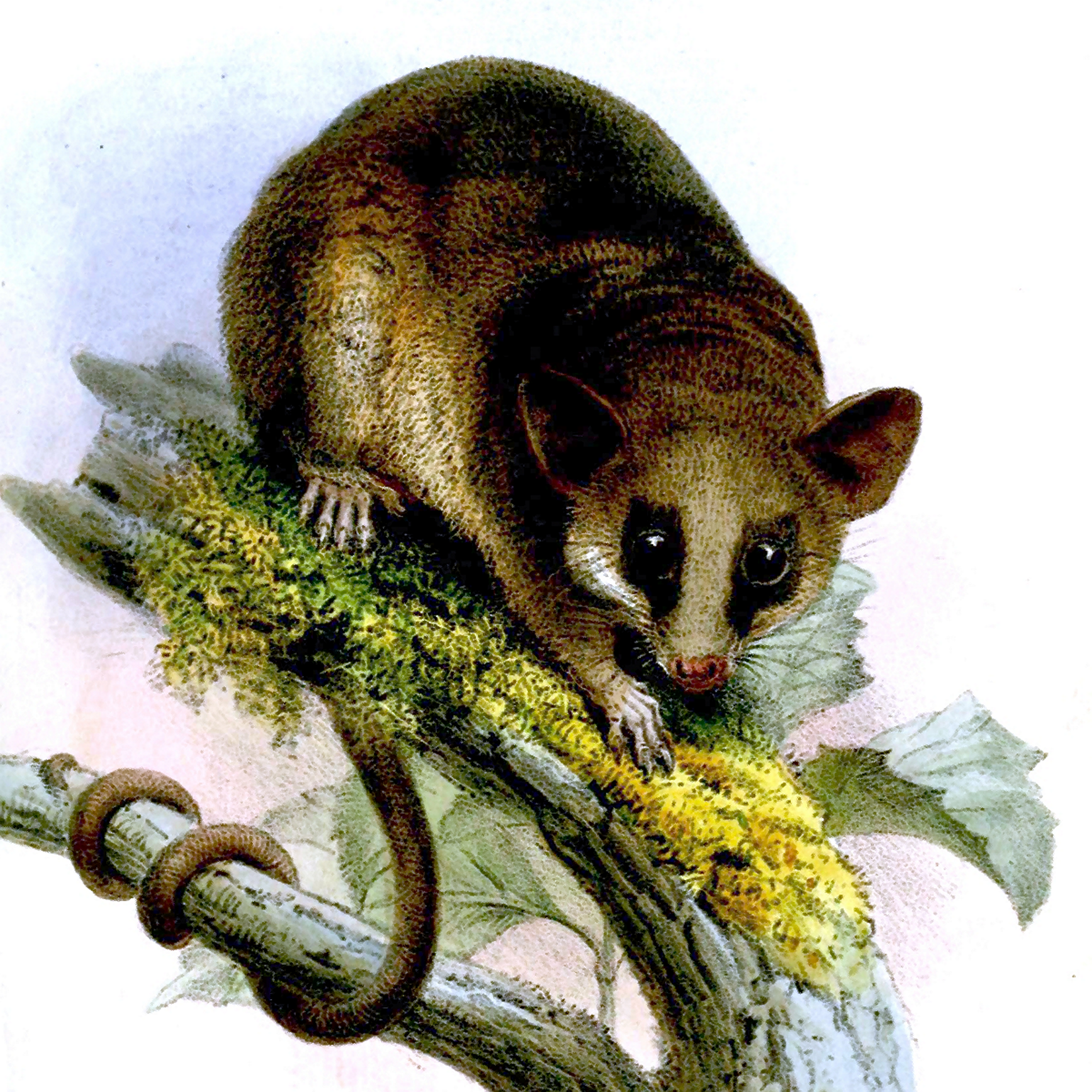 Didelphys waterhousii = Marmosa waterhousei